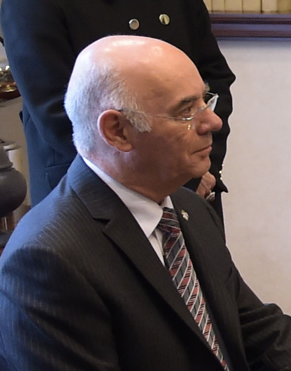 Reunión con el Primer Ministro de Quebec, Philippe Couillard. Residencia Oficial de los Pinos, Ciudad de México. 12 de octubre de 2015.